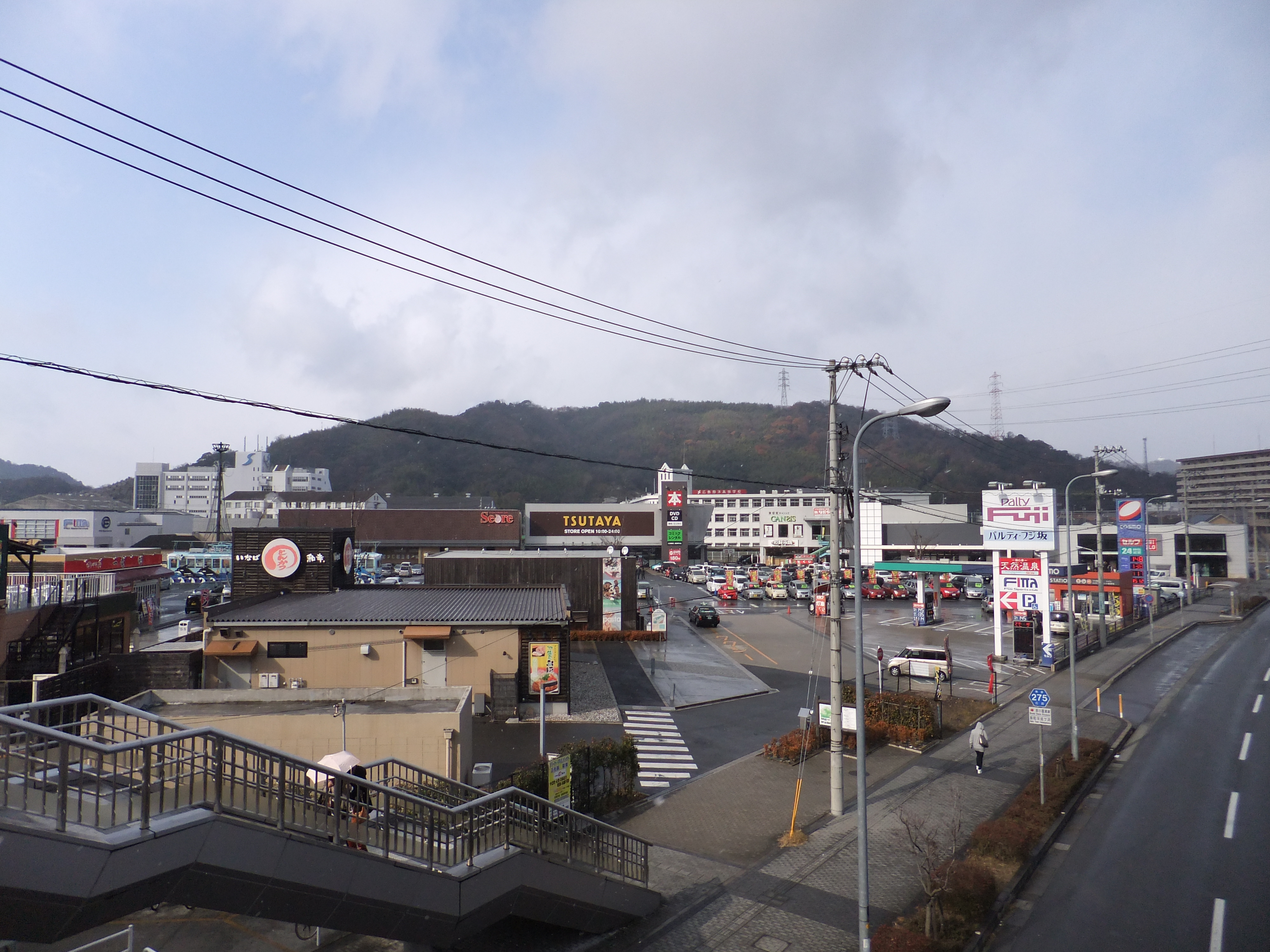 パルティフジ坂